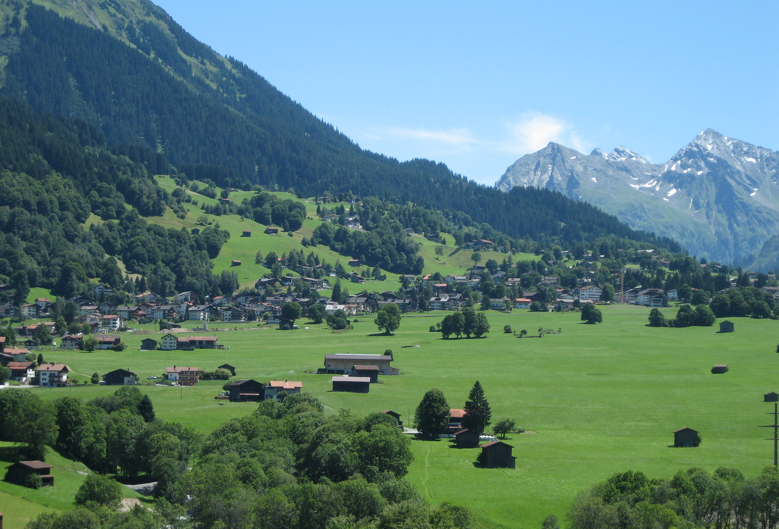 Klosters Dorf